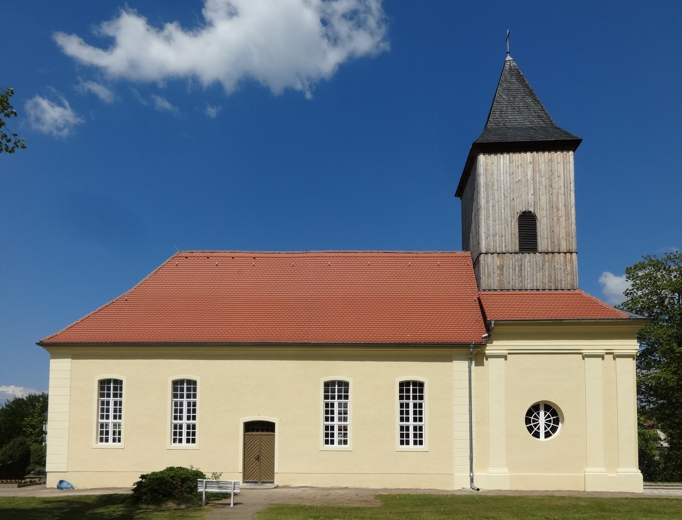 Die Dorfkirche Märkisch Wilmersdorf ist eine verputzte Saalkirche aus dem Anfang des 18. Jahrhunderts. Sie wurde 1746 um einen Kirchturm und ein Jahr später nach Osten hin um eine Gruft erweitert. Im Innern befinden sich eine schlichte Ausstattung aus der Bauzeit der Kirche sowie eine Fünte aus dem Jahr 1660.